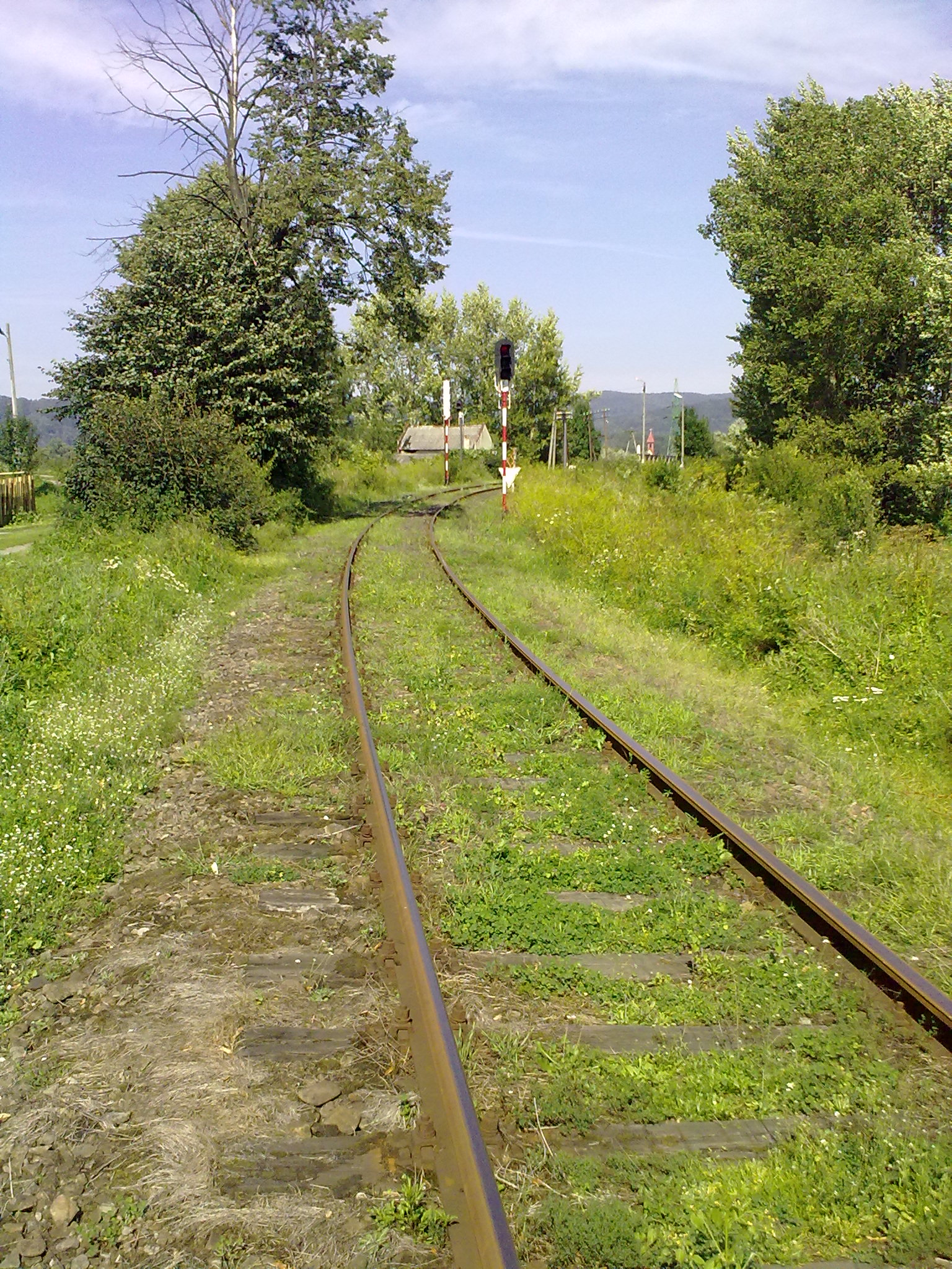 Łącznik kolejowy 617